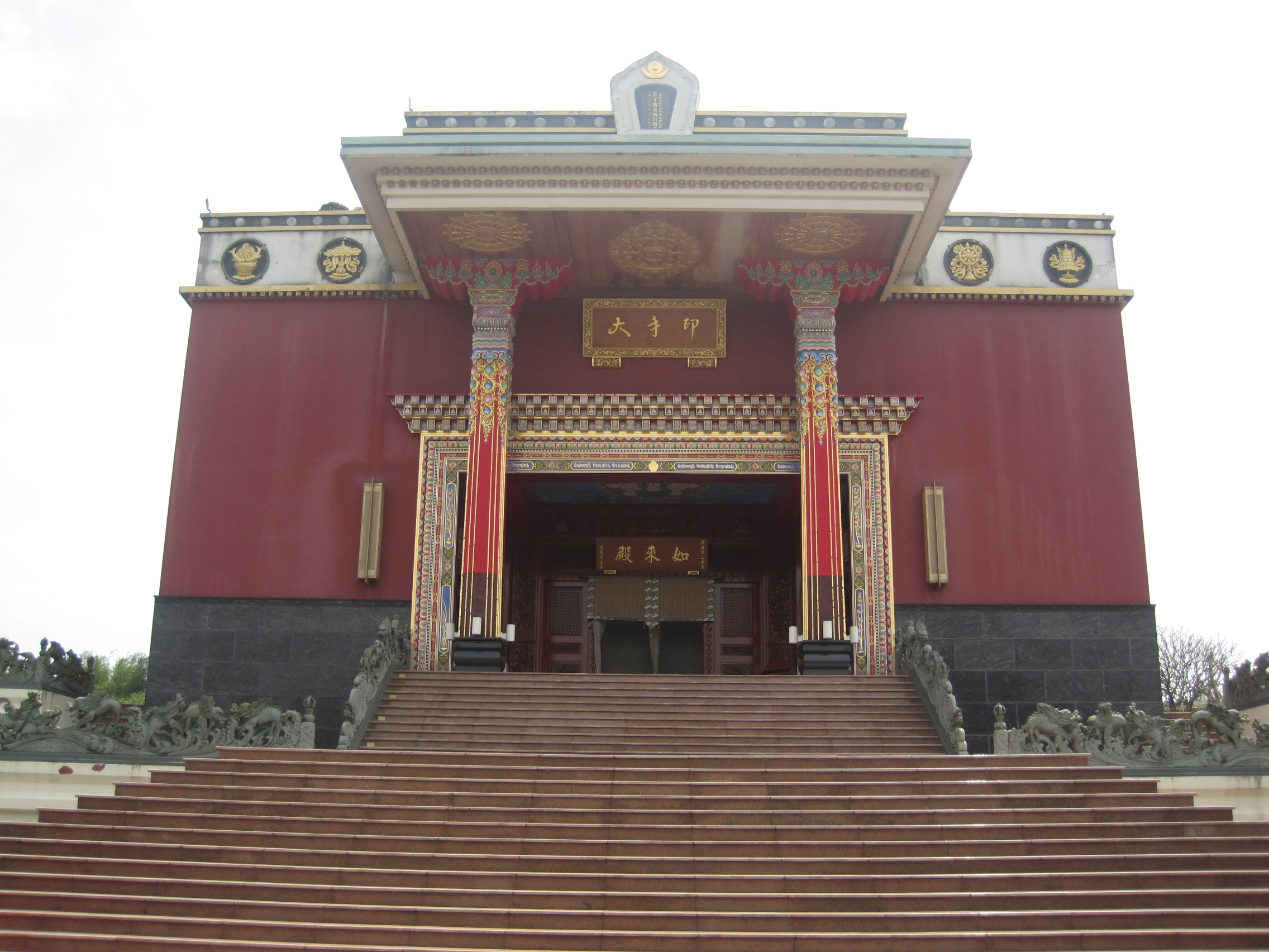 噶瑪噶居寺如來殿